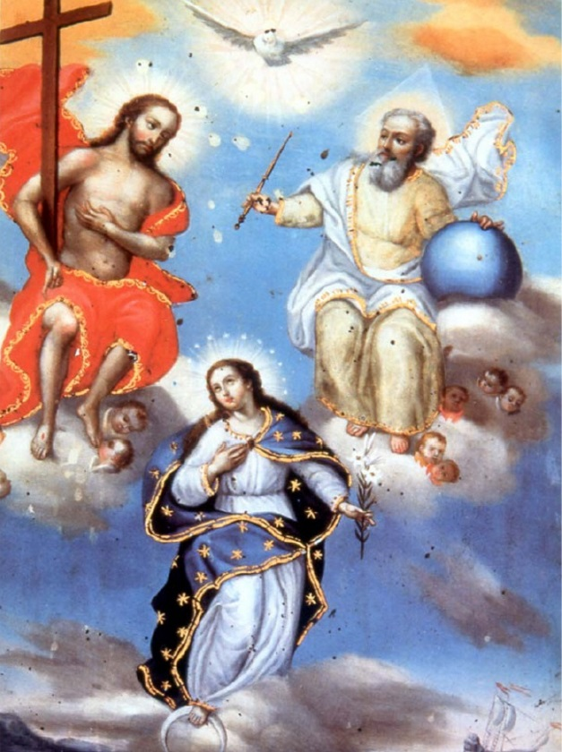 Coronación de la Virgen, óleo sobre lienzo del pintor quiteño Manuel de Samaniego (finales del siglo XVIII(.